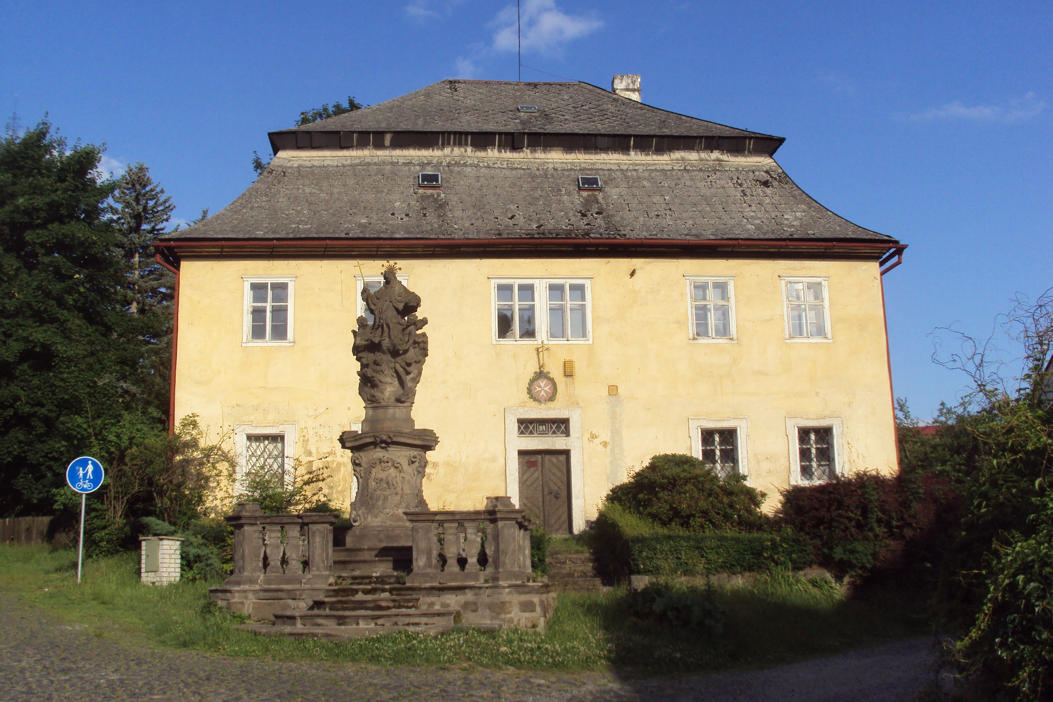 Fara ve Skalici poblíž kostela